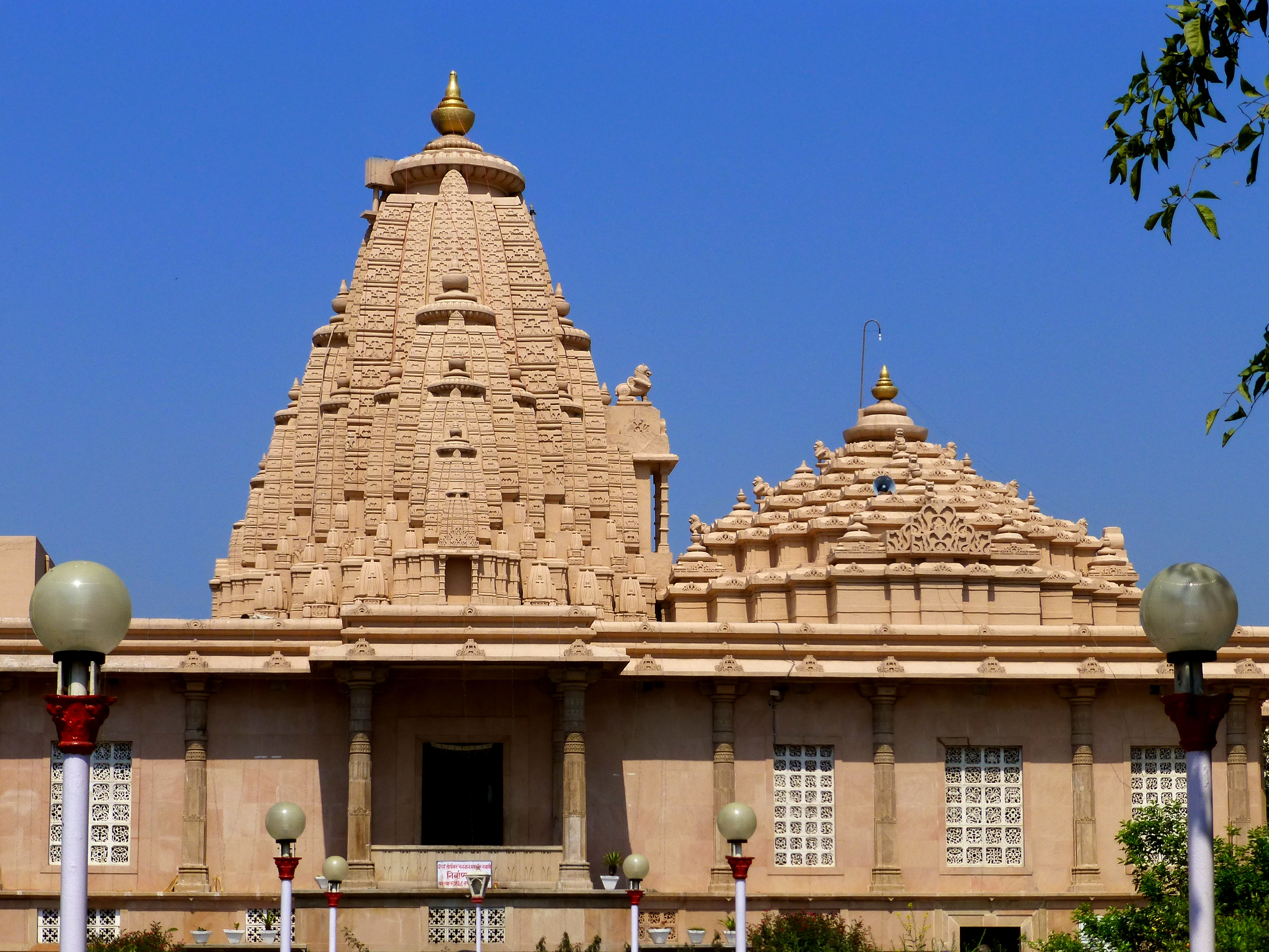 Gaon mandir at Pawapuri Photograph from Pawapuri in Bihar taken by Anandajoti.